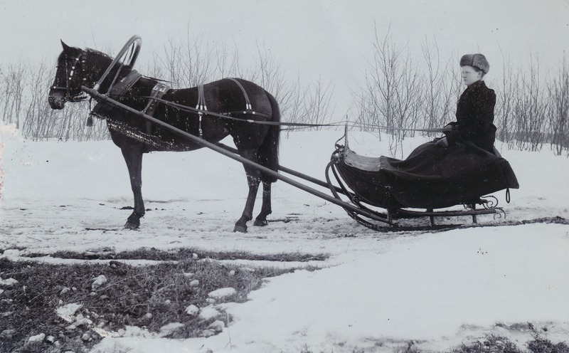 Hobune ja saan